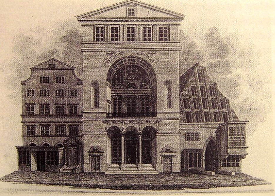 Stock exchange in Hamburg, engraving dating from 1825